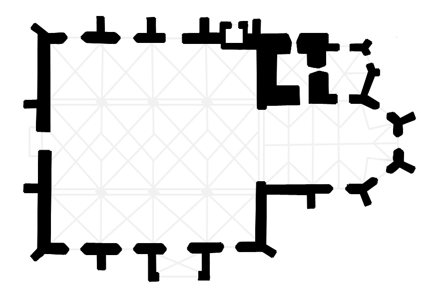 Kostel Proměnění Páně na hoře Tábor Půdorys